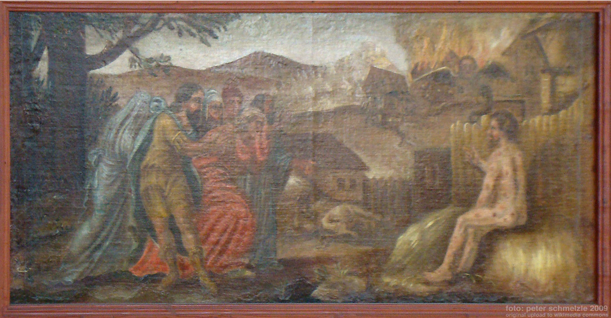 Malereien von 1636 an der Brüstung der unteren Westempore der Kilianskirche in Bretzfeld-Waldbach